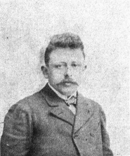 Österreichischer Politiker, Reichsratswahl 1907, Name siehe Dateiname